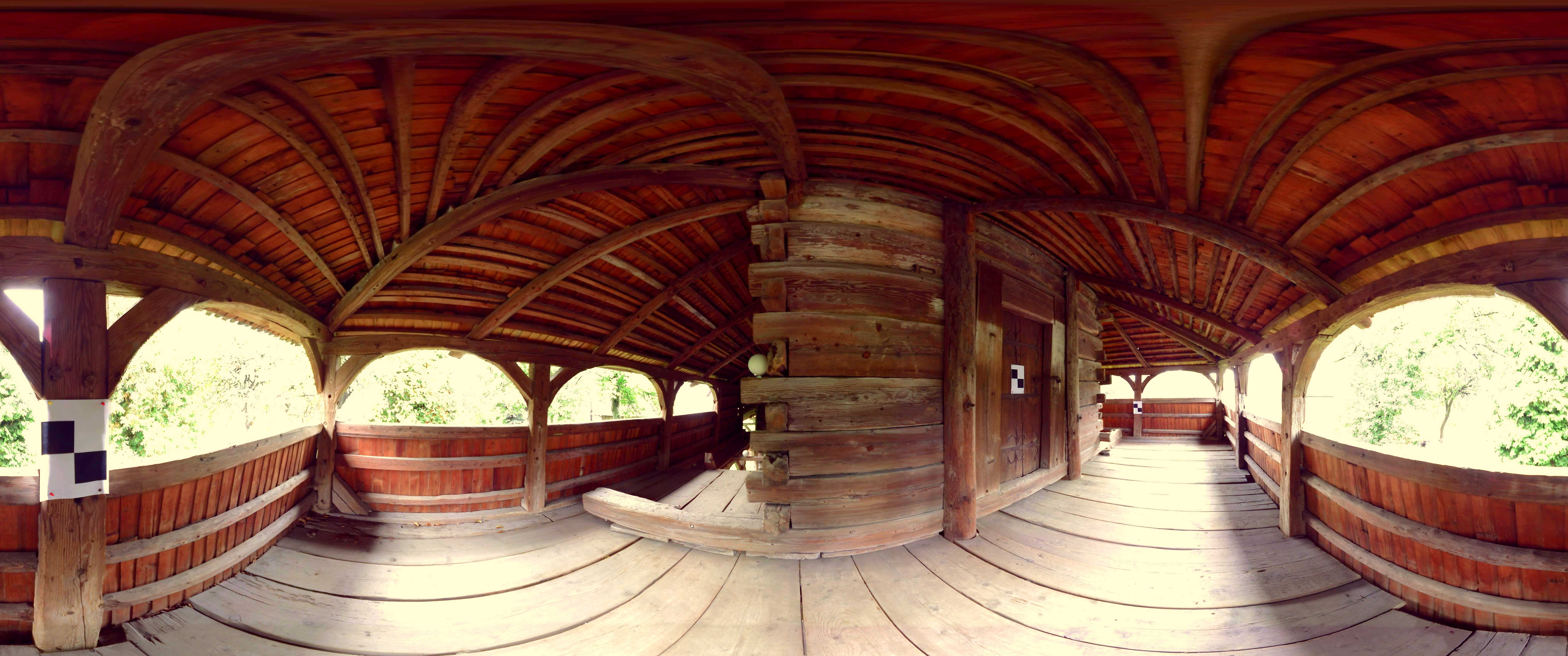 Церква Воздвиження Чесного Хреста (дер.), Дрогобич, вул.Зварицька, 7